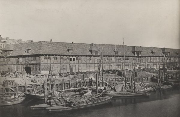 Abbildung des ehemaligen Bauhofs am Deichtor, Blick auf eine Hausfront, davor Kutschen, im Vordergrund die Elbe mit Schuten.